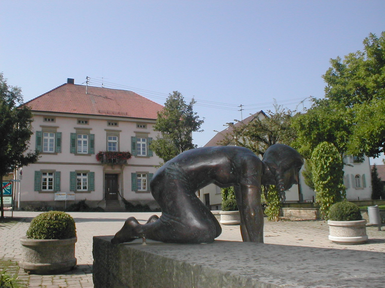 Dorfplatz in Fürfeld (Bad Rappenau) mit Brunnen und Blick zum Alten Pfarramt